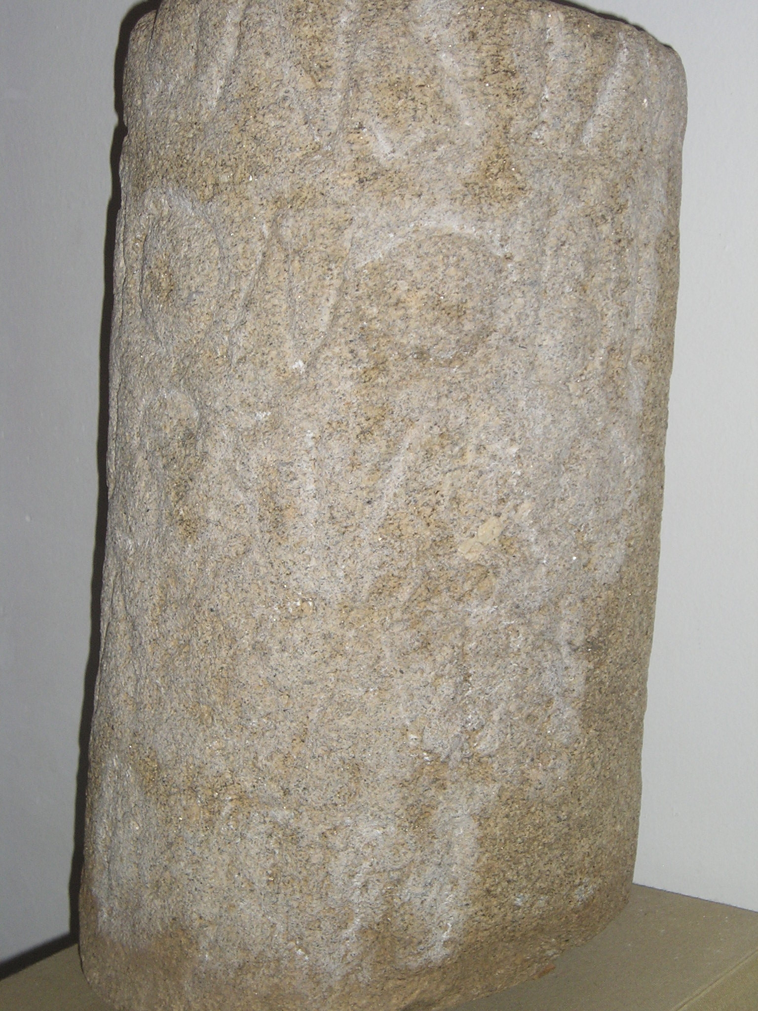 Miliario romano del siglo IV depositado en el Museo de Cáceres, prpocedente de la localidad de Casas del Monte (Cáceres, españa) sobre la Vía de la Plata, correspondiente con la inscripción CILCáceres 3, 963 = ERCCáceres 47: [D(omino) n(ostro)/ Flavio Iulio]/ Constan/tio nobi/lissimo/ Caesari/ Brit(annico)/